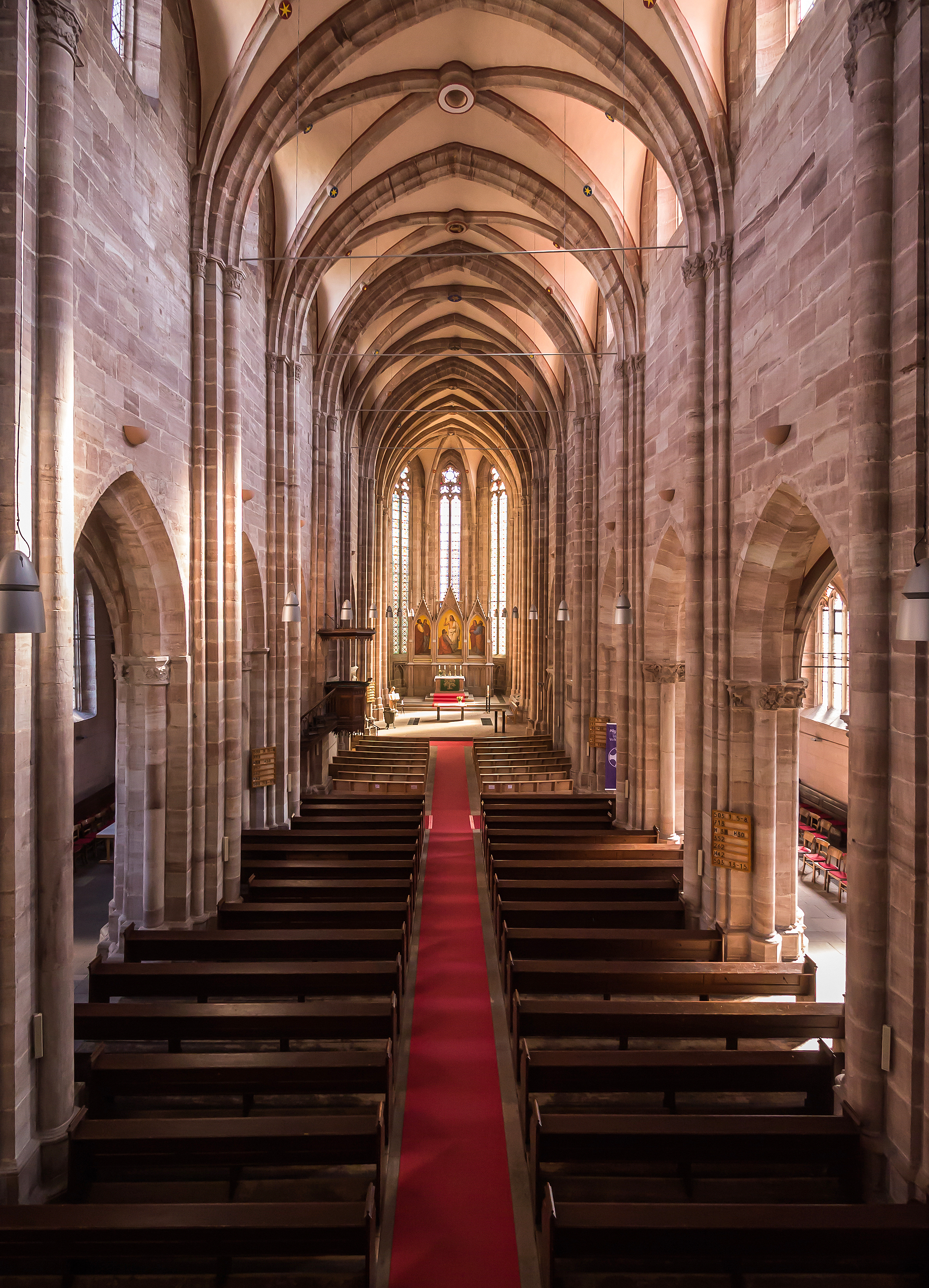 Heilbad Heiligenstadt Friedensplatz 1 St. Martin Pfarrkirche (evangelisch) Mittelschiff 7